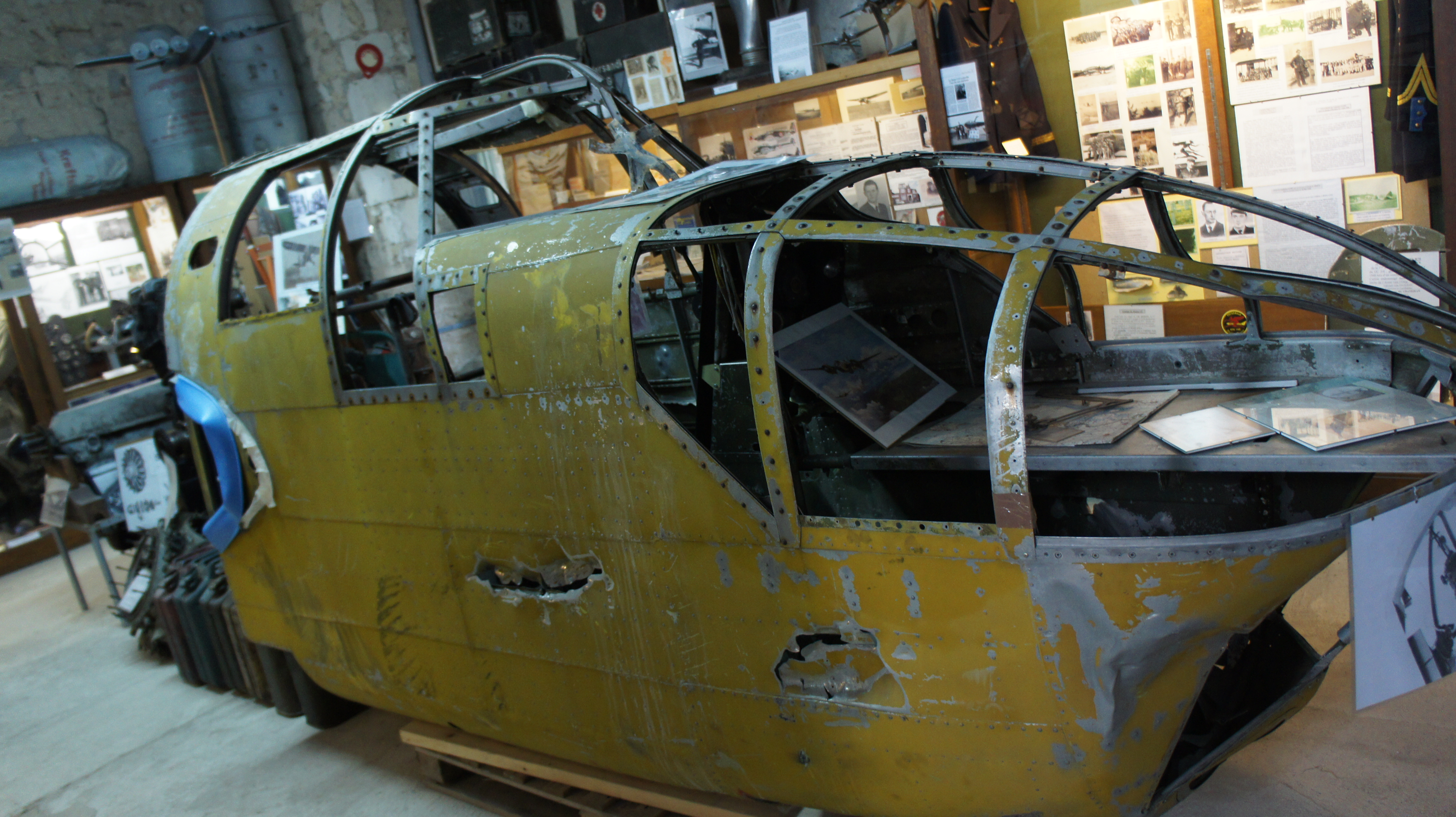 Présenté au Musée du terrain Vraux-Condé.